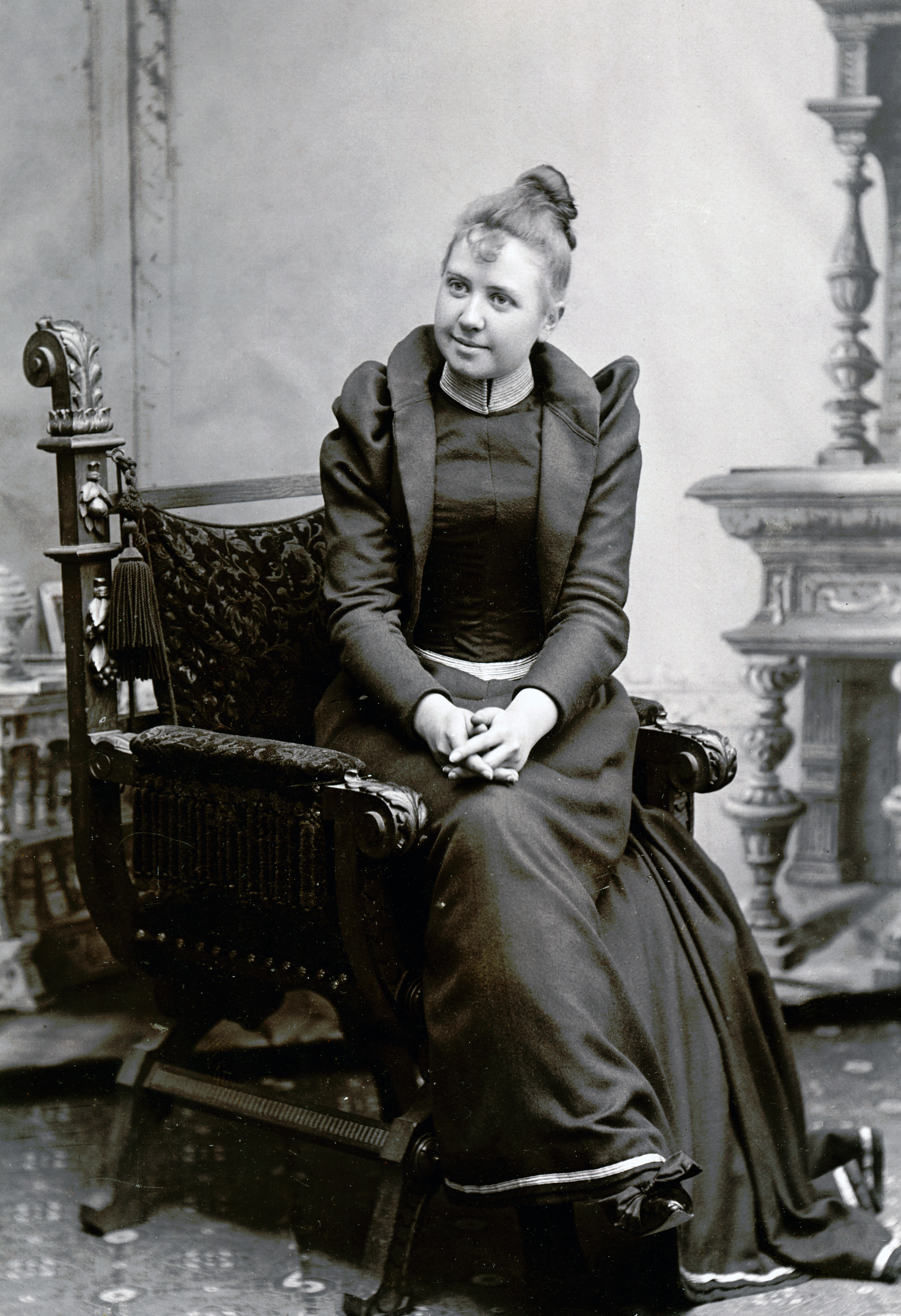 Signe Widell, skådespelare vid Hjalmar Selanders sällskap 1891